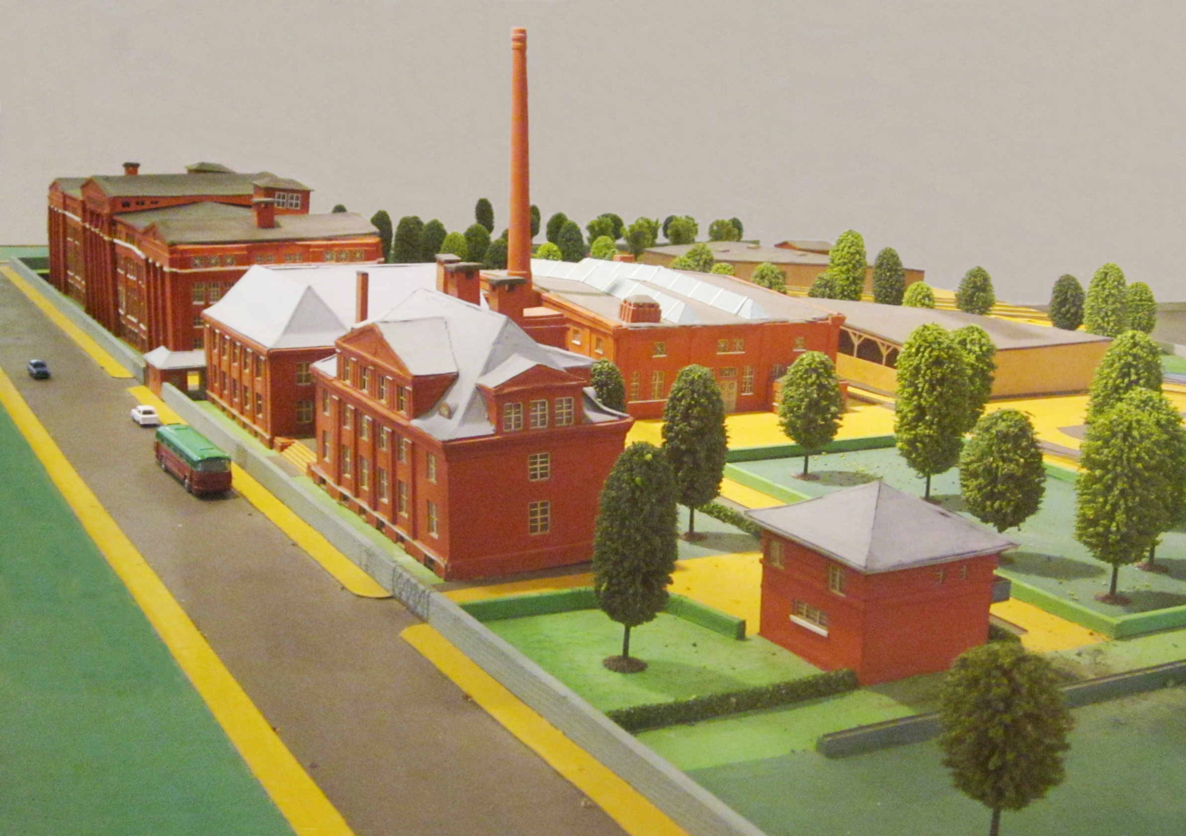 Riesa Nudelfabrik Modell im Nudelmuseum